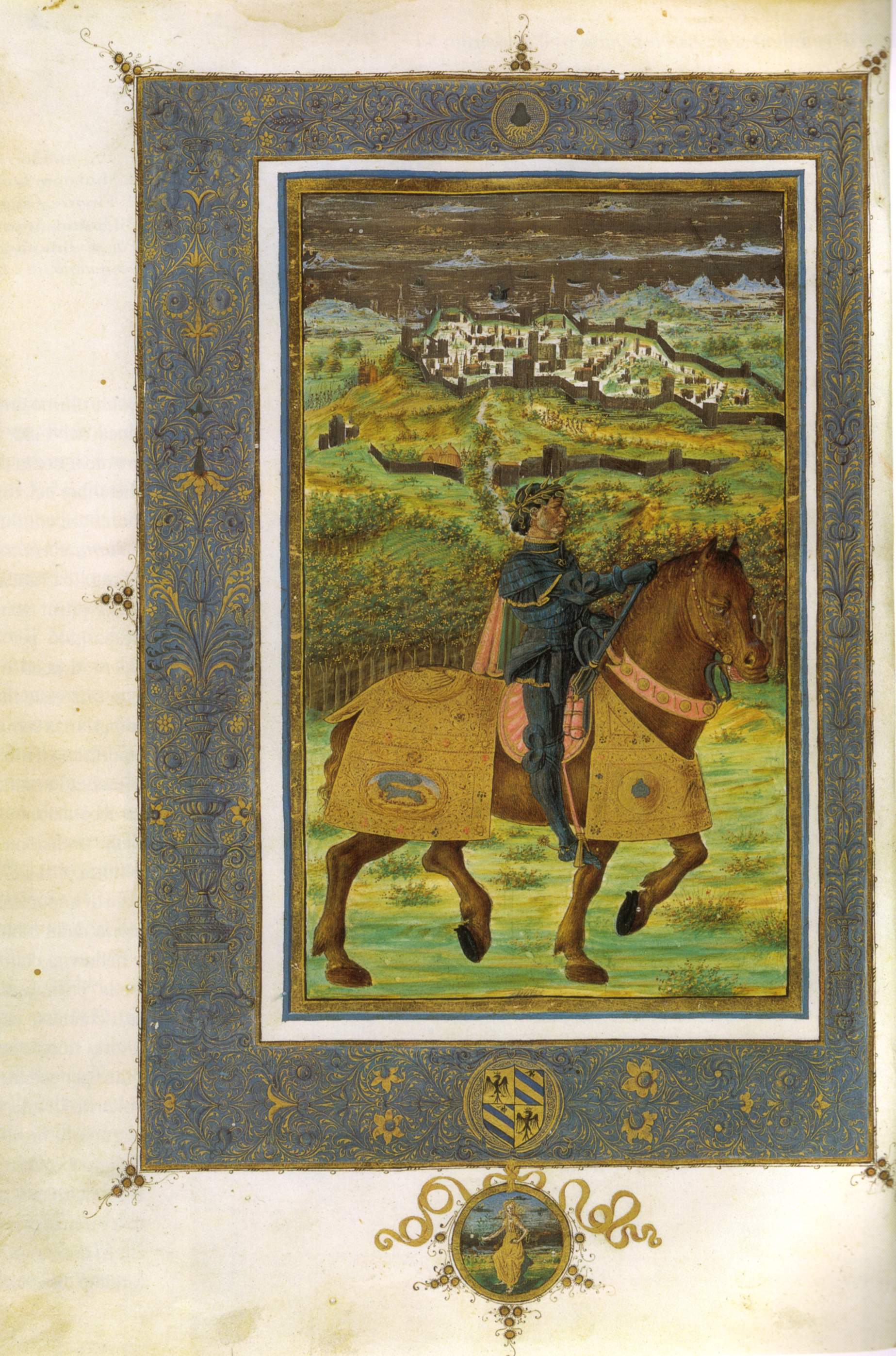 Miniatore fiorentino del 1472, federico da montefeltro durante l'assedio di volterra, biblioteca apostolica vaticana, poggio bracciolini, historia florentina, ms. urb lat 491 f. IV v